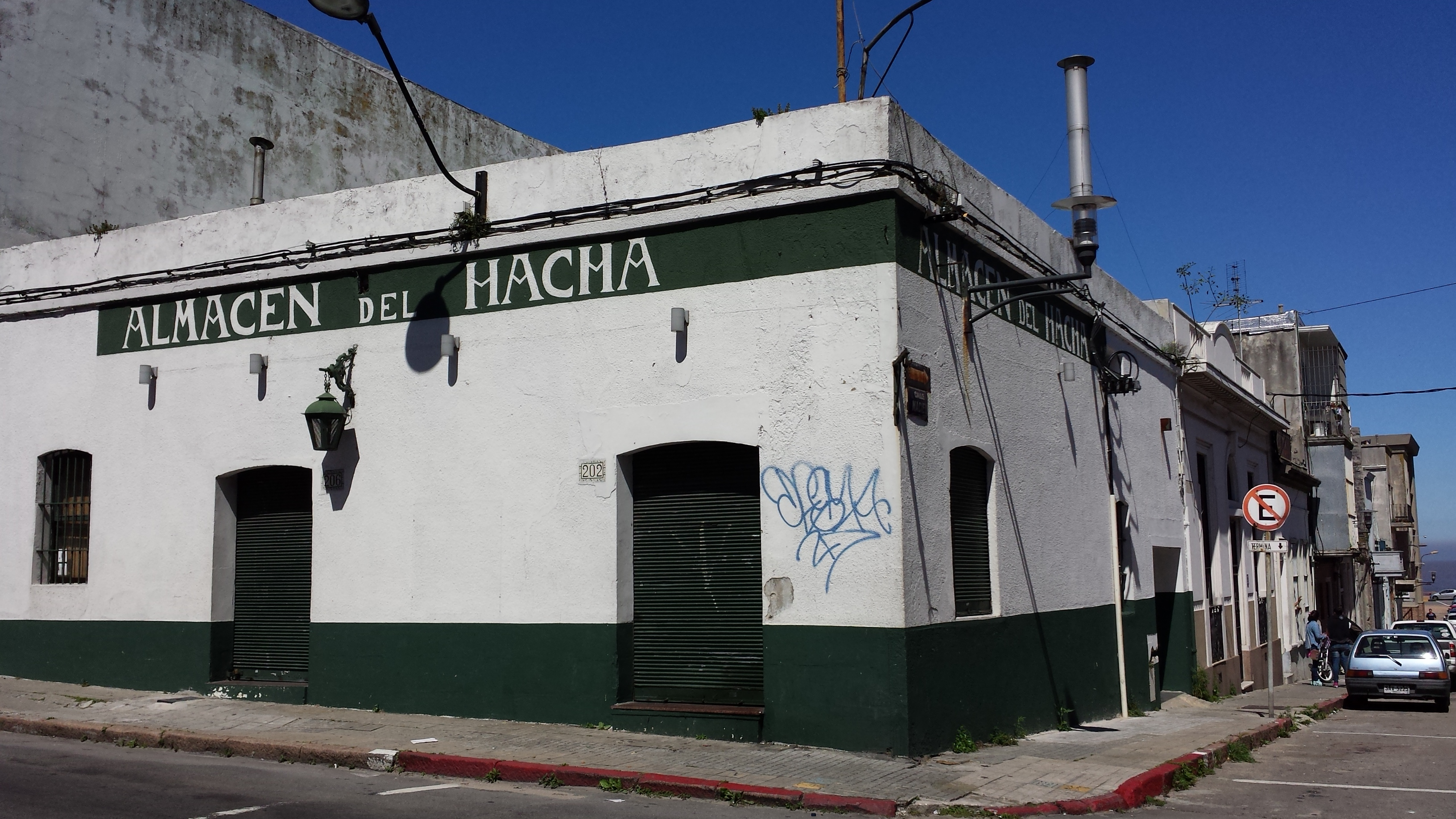 El Hacha, primer "boliche" de Montevideo, data de 1730